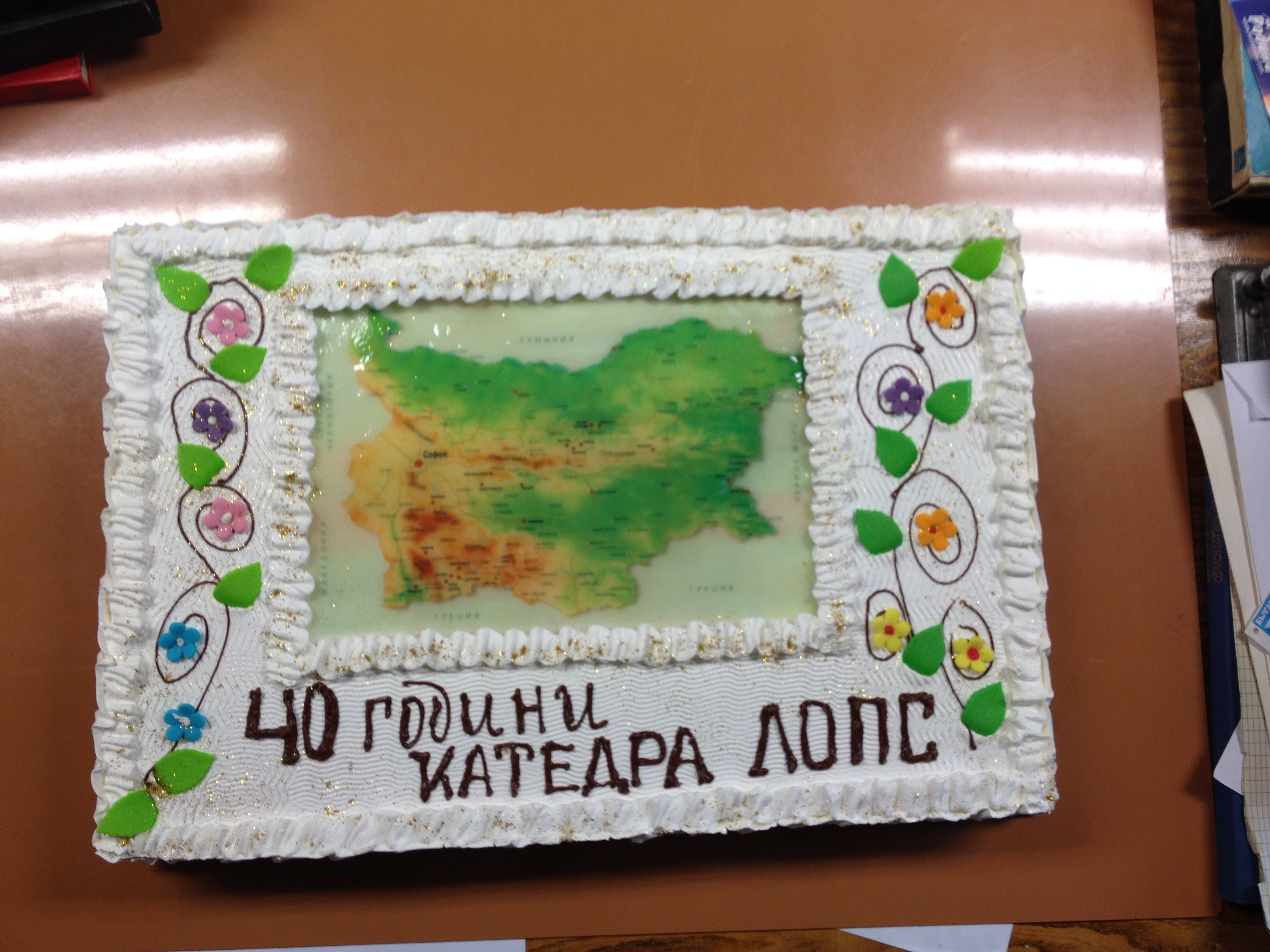 Празнична торта по случай 40 години катедра ЛОПС, ГГФ